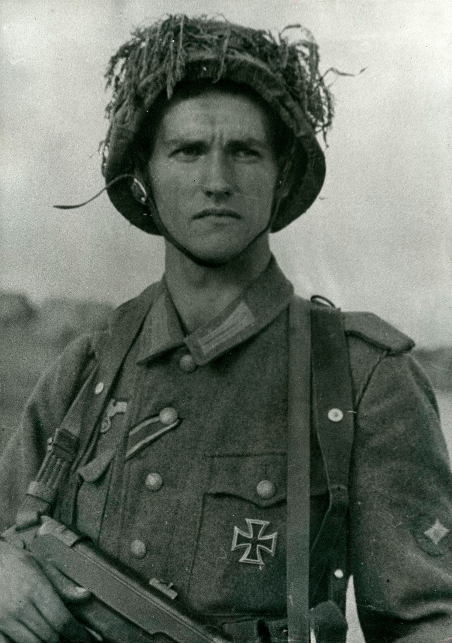 Bild: Roberto Mericaechevarría Alcorta trägt oberschütze uniform mit einem Eisernen Kreuz und hält eine maschinenpistole 40.